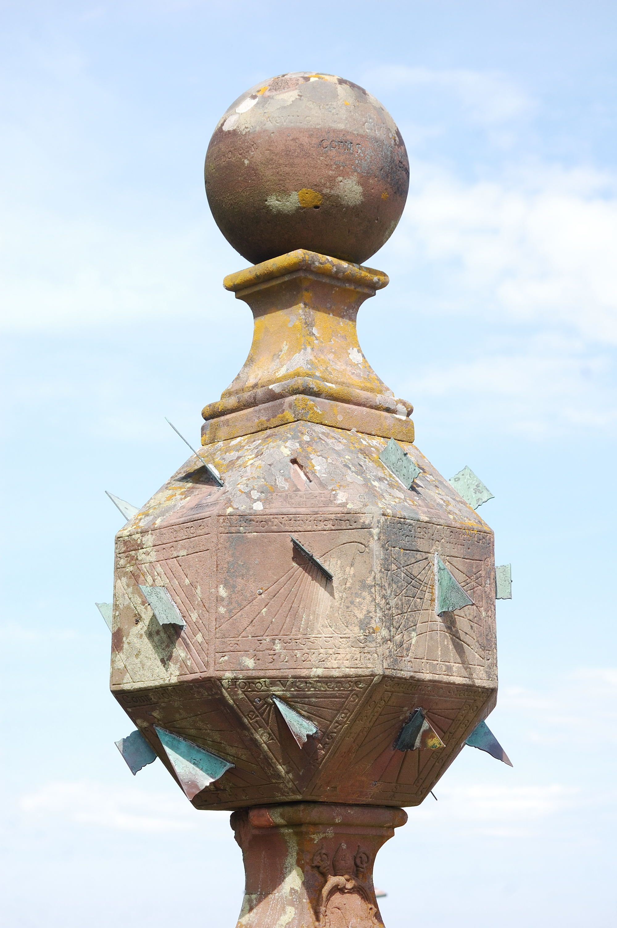 Sun clock